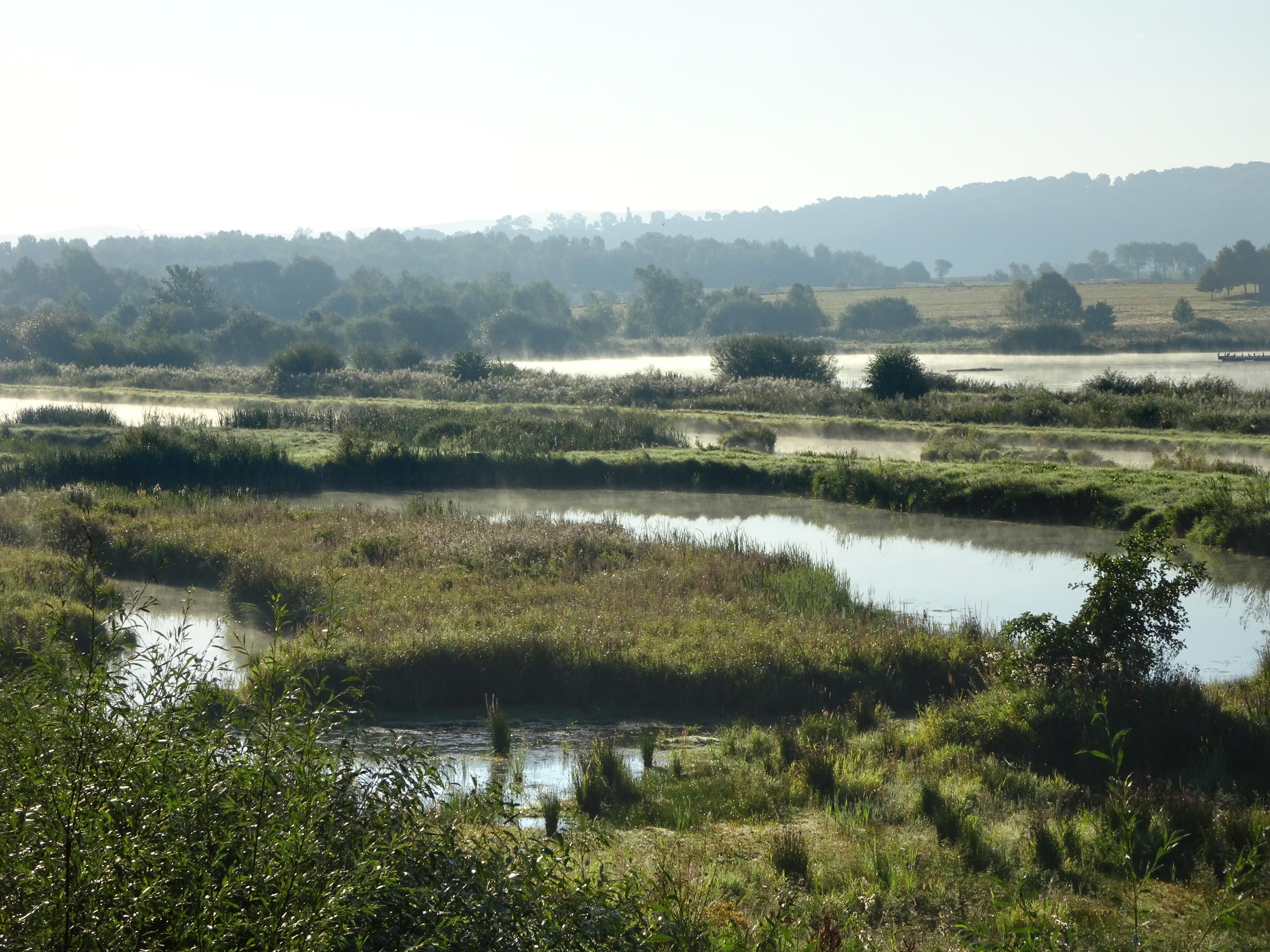 Der „Rhäden bei Obersuhl und Bosserode“ liegt in den Gemarkungen Obersuhl und Bosserode der Gemeinde Wildeck im nordosthessischen Landkreis Hersfeld-Rotenburg. Auslaugungen von Kalisalzen aus dem, aus marinen Sedimenten entstandenem Zechsteinund tektonische Vorgänge haben zu einem schrittweisen Nachsacken des Untergrunds geführt. Die einstige Sumpflandschaft wurde ab der Mitte des 19. Jahrhunderts trockengelegt und bis in die Nachkriegszeit bearbeitet. Mit dem Ausbau der DDR-Grenzanlagen verfiel das Entwässerungssystem, was zur Aufgabe der landwirtschaftlichen Nutzung führte. In den 1970er Jahren begannen Naturschützer mit den Arbeiten zur Rückführung des Rhädens zu einem Feuchtbiotop, um den in ihrem Bestand bedrohten Pflanzen- und Tierarten einen angemessenen Lebensraum zu sichern. Nach abgeschlossener Rekultivierung war (wieder) eine Auenlandschaft entstanden, die vor allem für Vogelarten als Brut-, Nahrungs- und Rastgebiet überregionale Bedeutung besitzt.